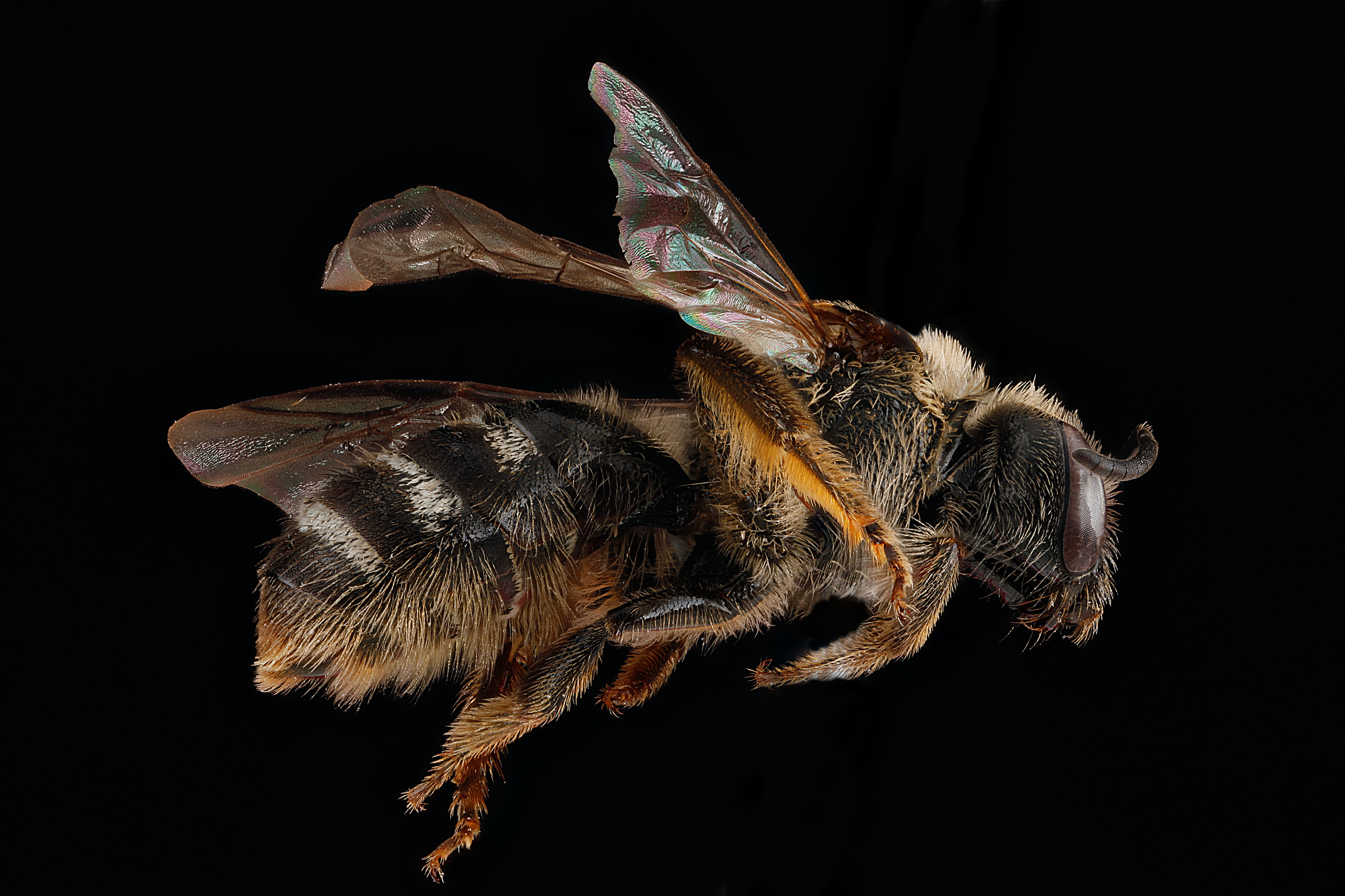 Lasioglossum leucozonium, female